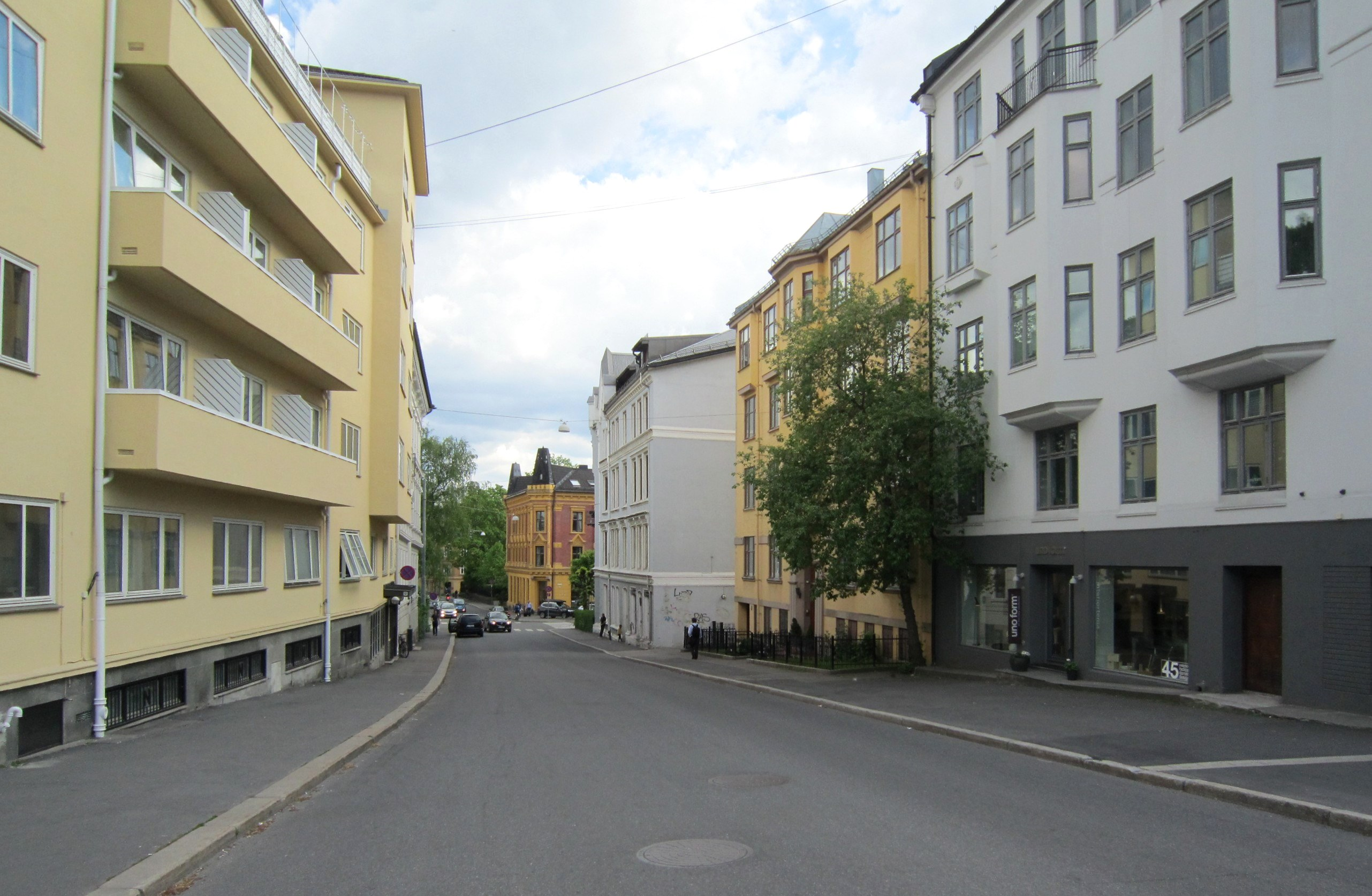 Uranienborgveien sett nedover mot Parkveien. Nr. 4 i bakgrunnen (hjørnet ved Inkognitogaten).